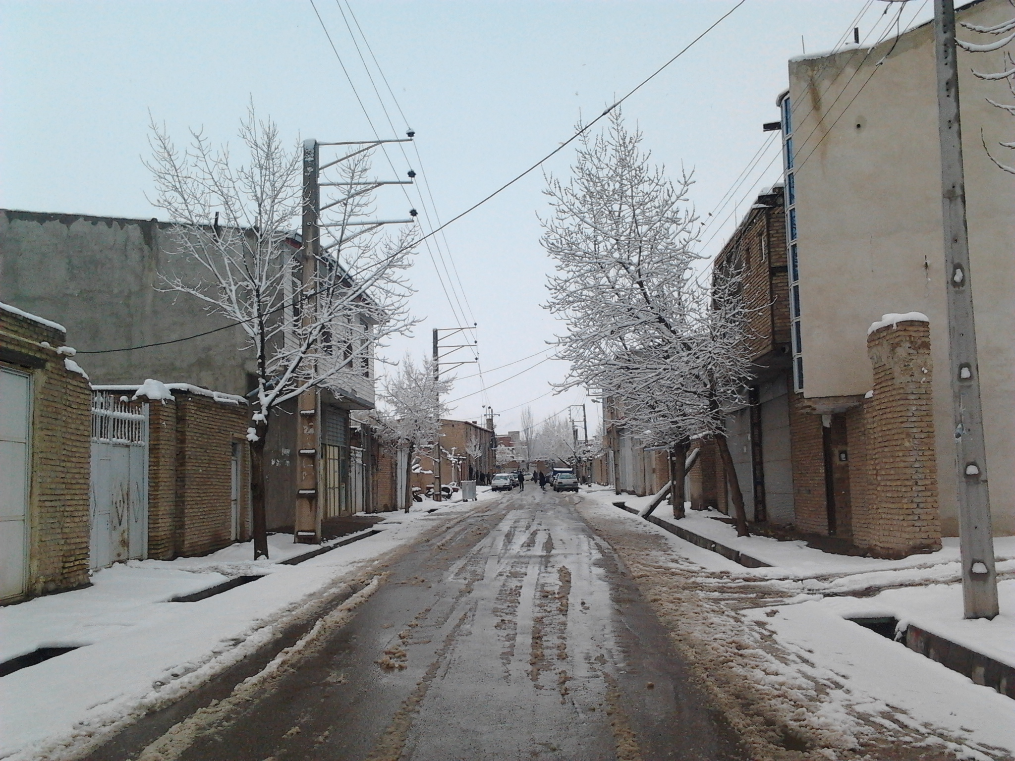 تاریخ : 2014-03-13